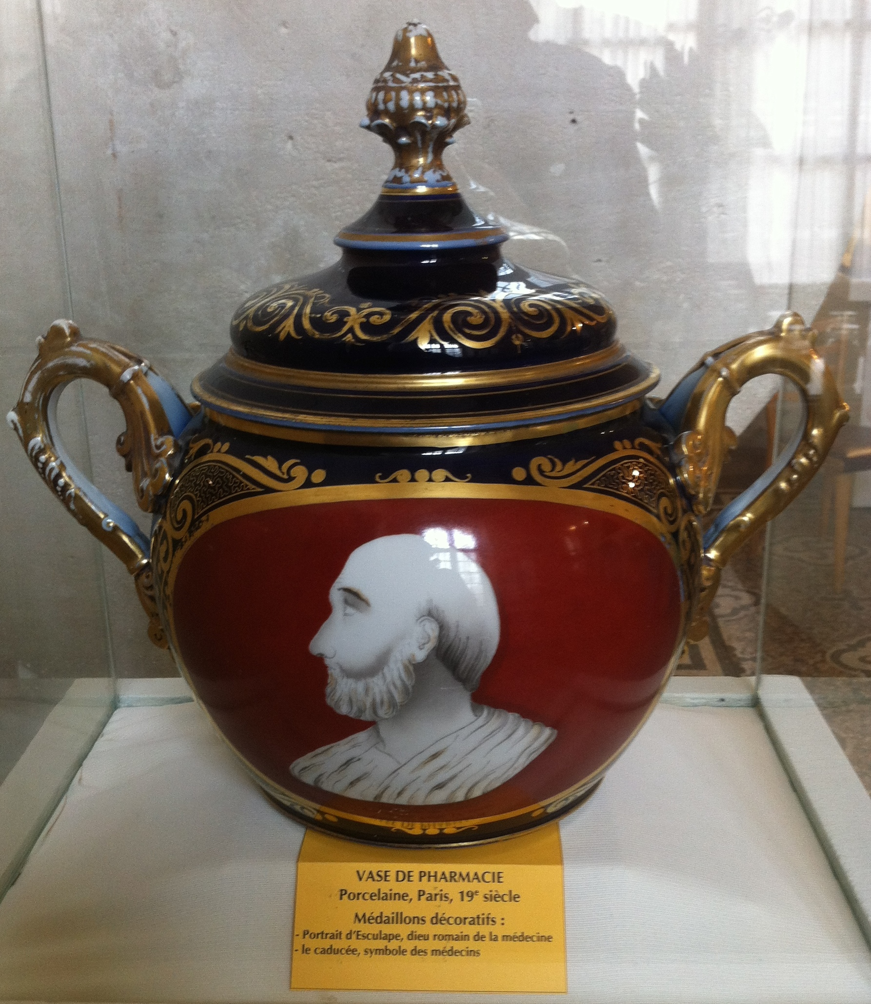 Vase de Pharmacie. Porcelaine, Paris, 19e siècle. Médaillons décoratifs : - Portrait d'Esculape, dieu roman de la médecine. - le caducée, symbole des médecins.